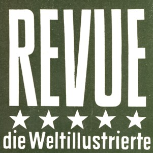 Logo der Revue bis 1952